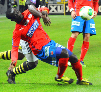 Ema Boateng